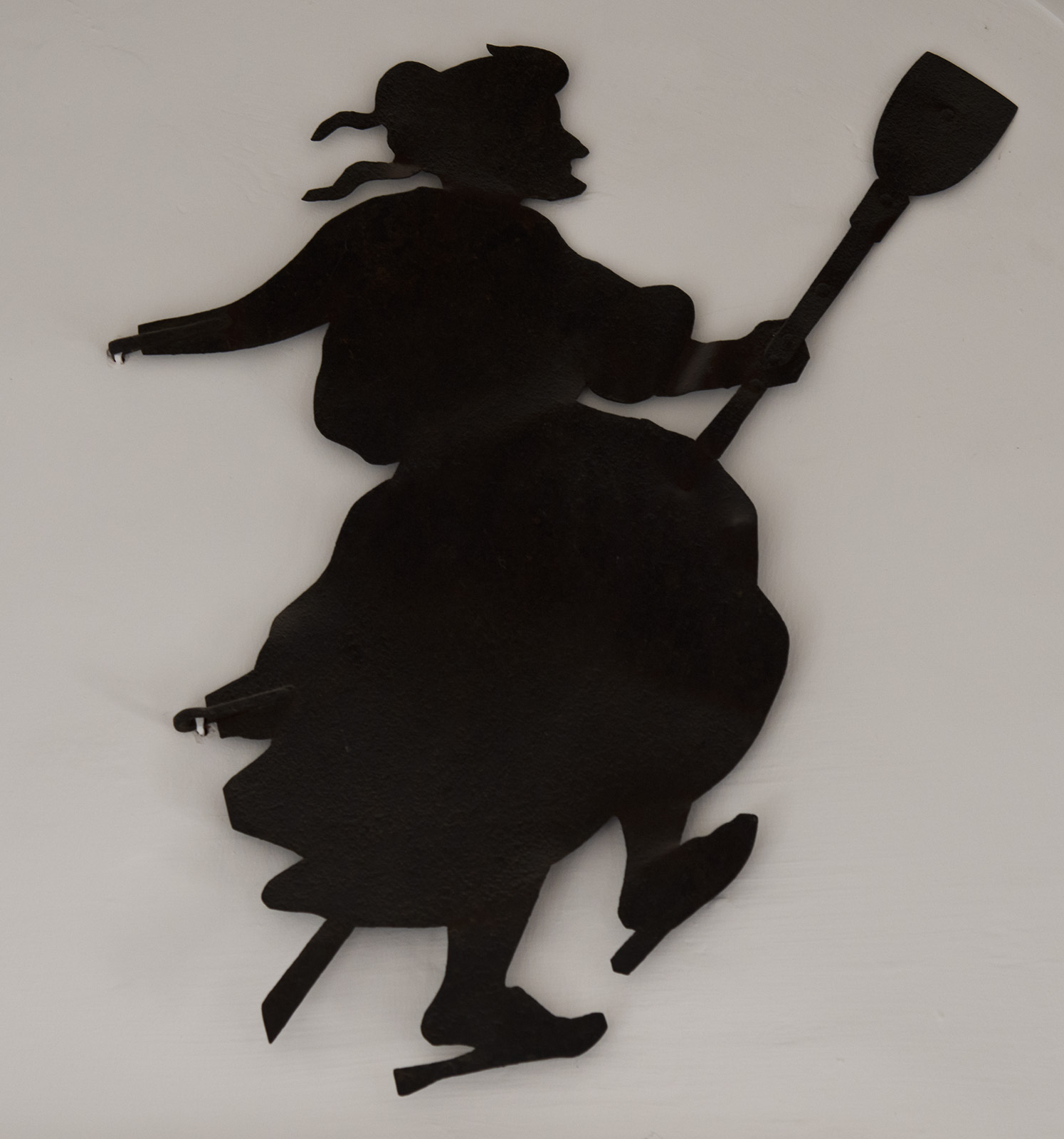 Hohensalzburg Castle